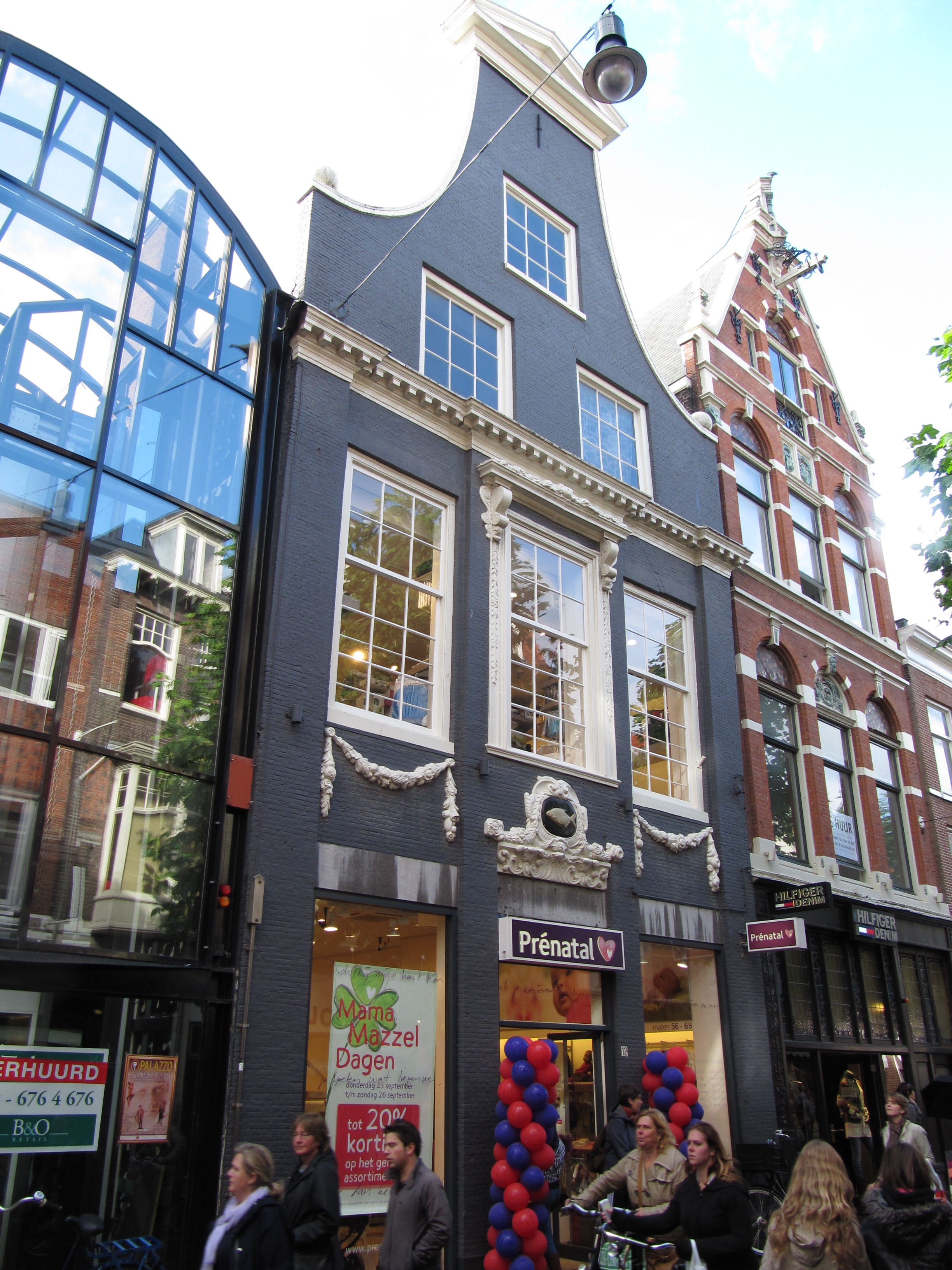 De vergulde Brasem, House with gablestone depicting a fish, Barteljorisstraat 12, Rijksmonument 18969, Haarlem